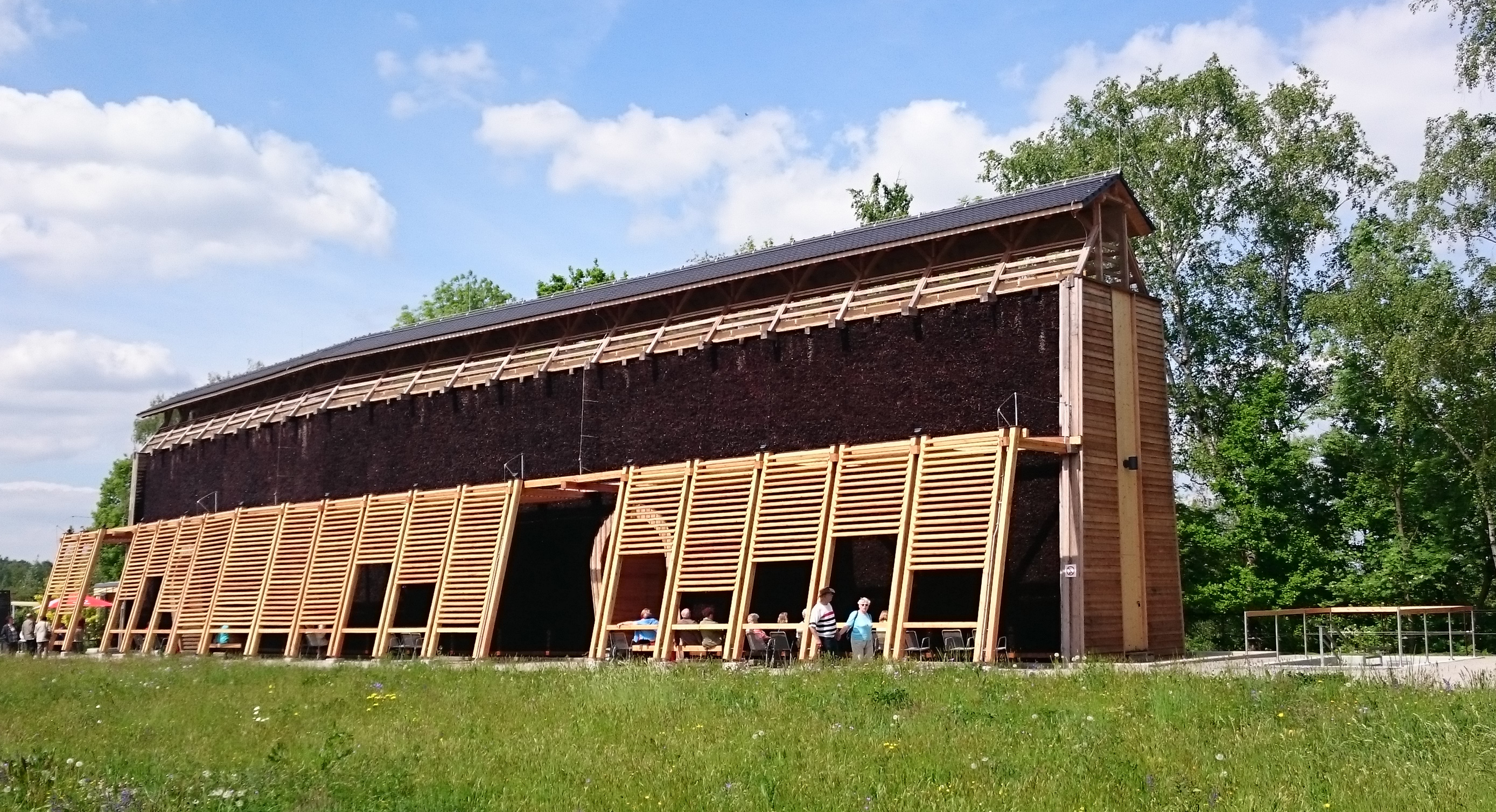 Das neu errichtete Gradierwerk auf dem Gelände der Landesgartenschau in Oelsnitz 2015.